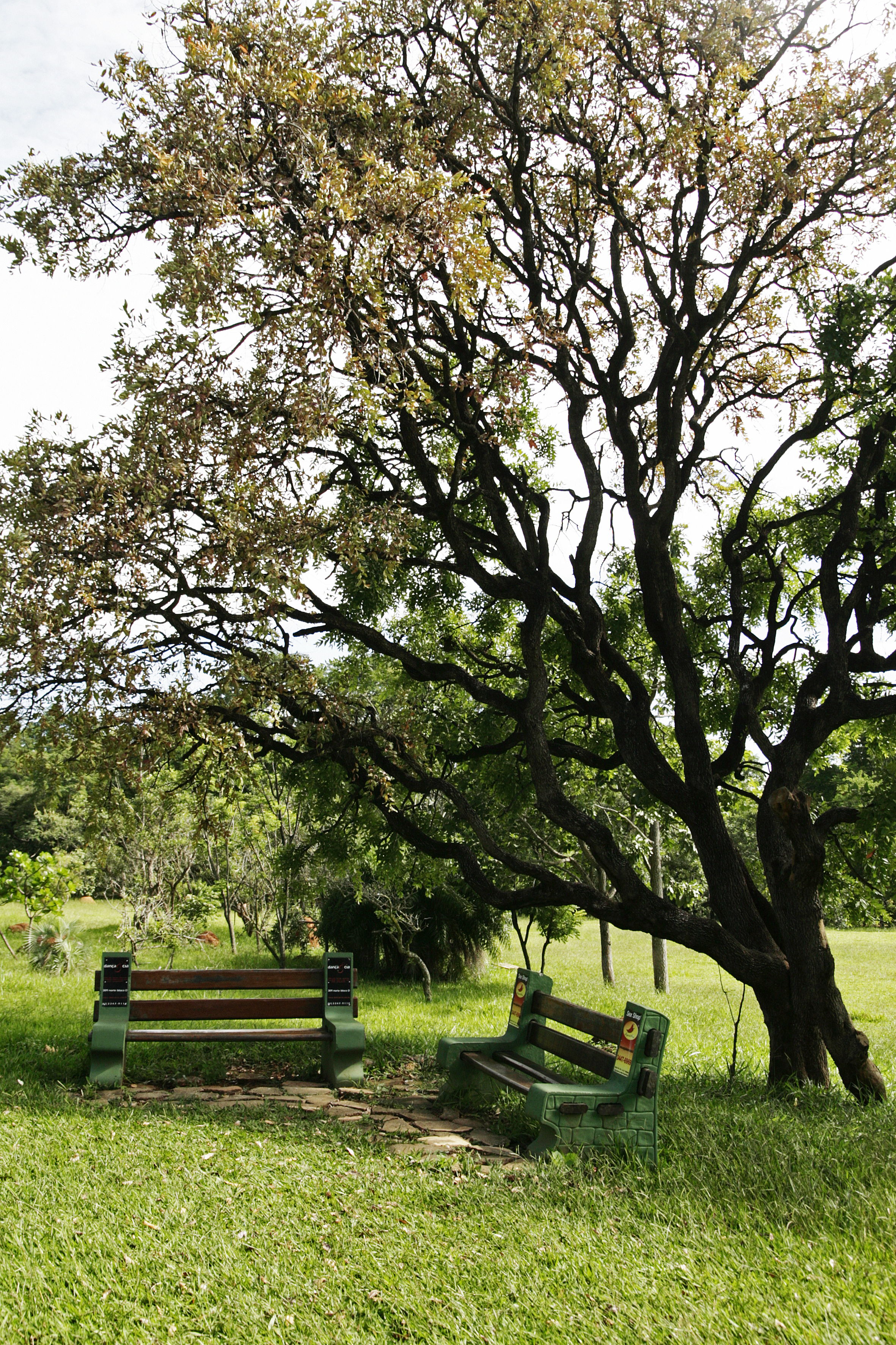 Bancos no Parque Olhos D'Água